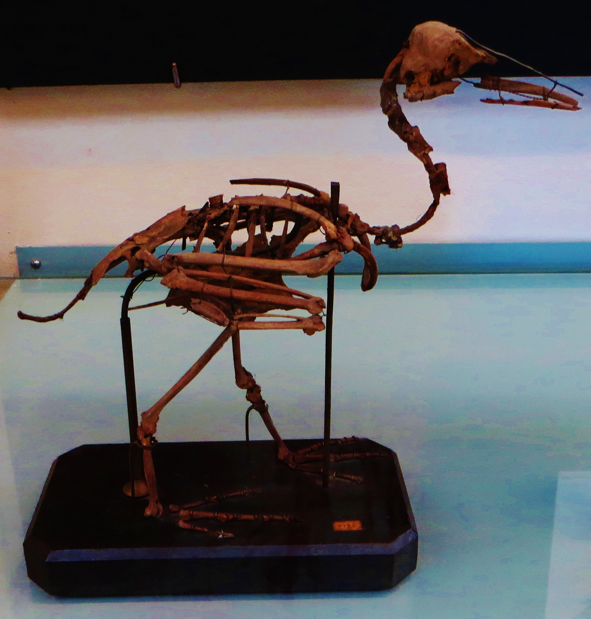 Fossil of Anas blanchardi, an extinct bird- Took the photo at Museum Histoire Naturelle, Paris